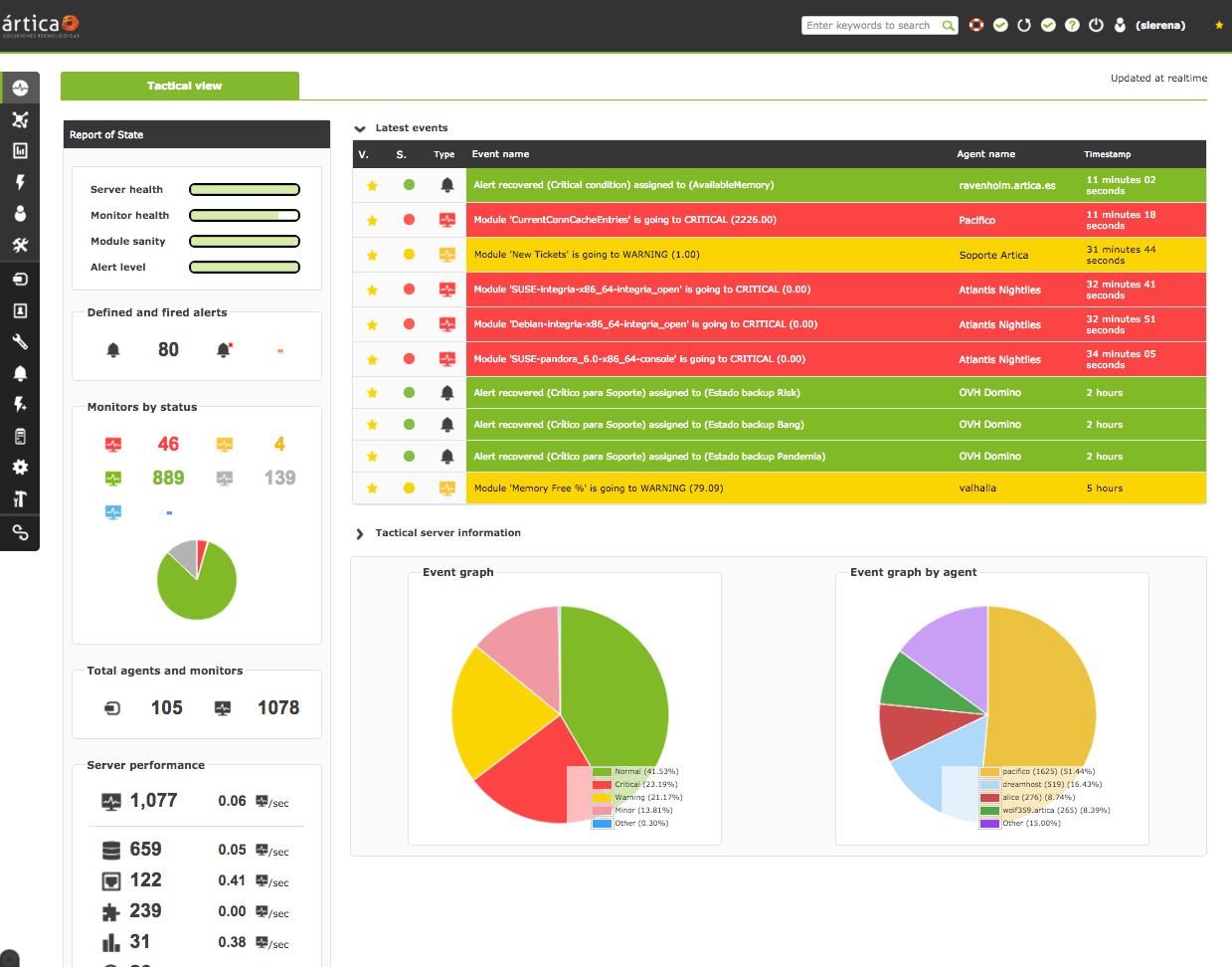 Captura de pantalla de Pandora FMS 6.0 SP3